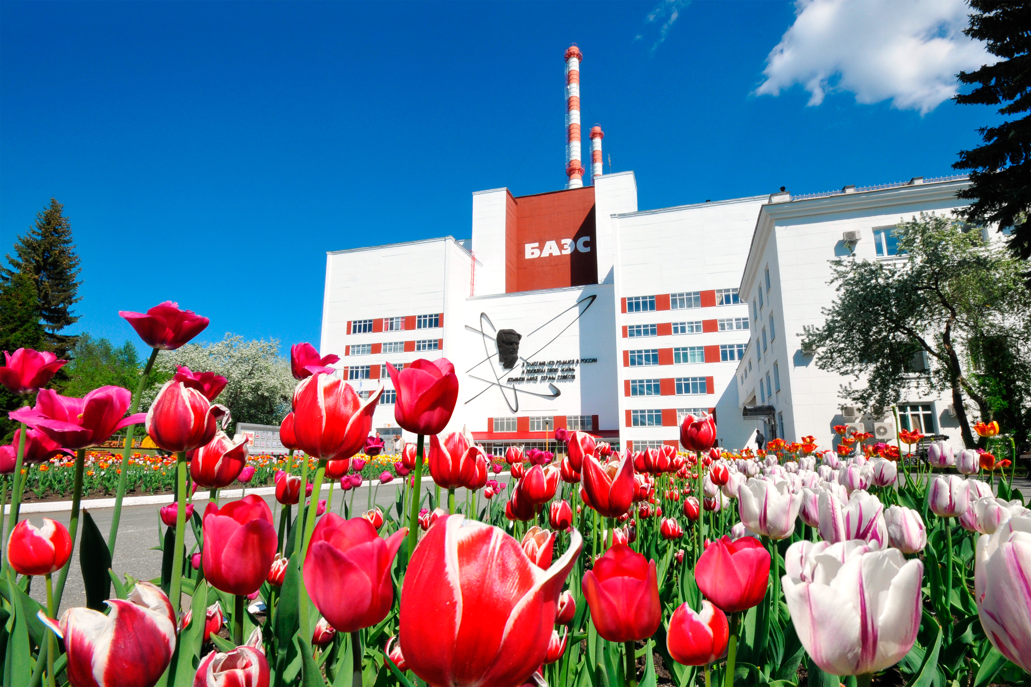 1 очередь Белоярской АЭС